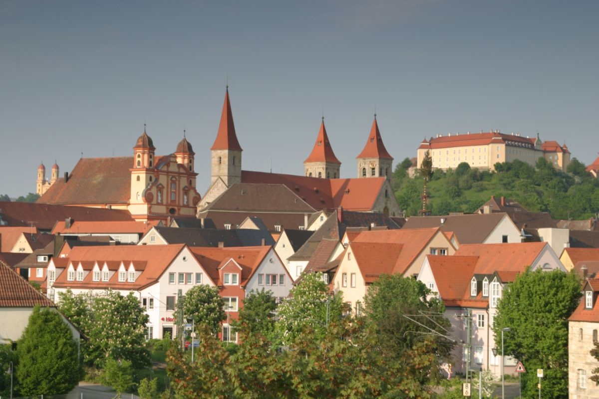 Stadtansicht von Ellwangen